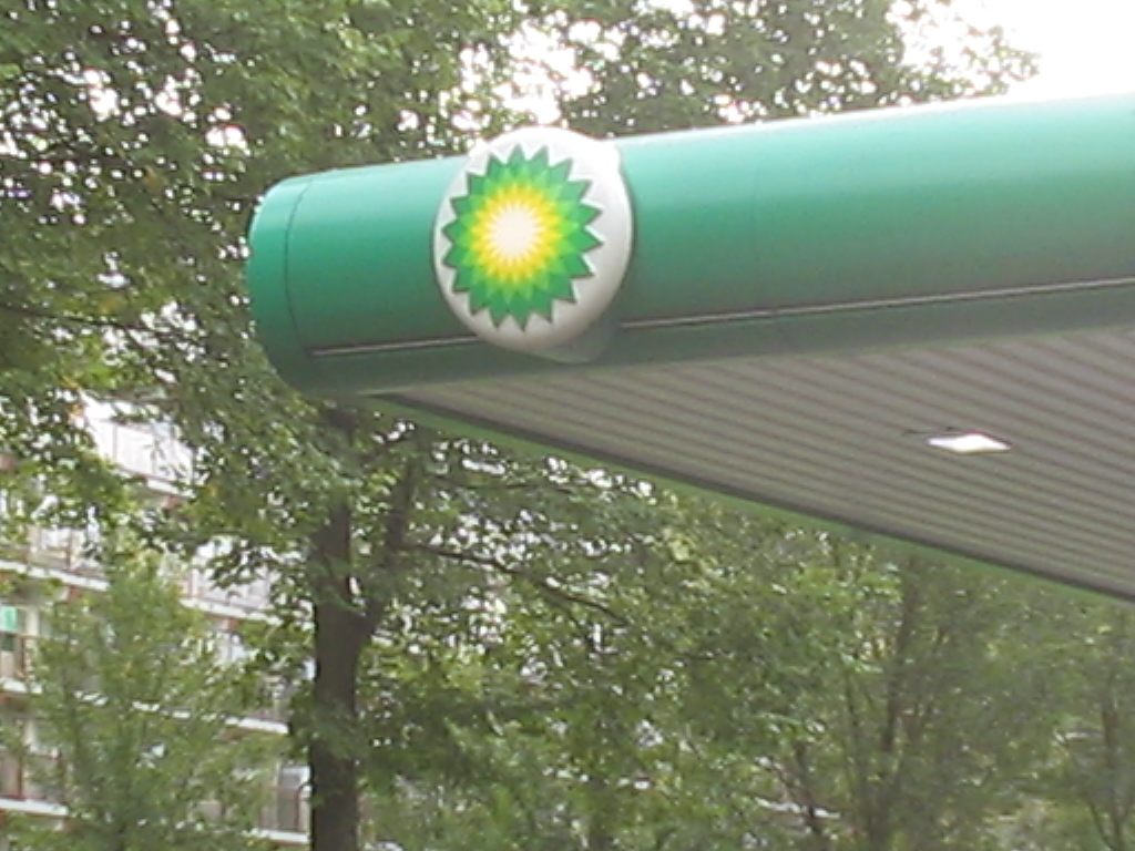 BP logo, Delft, oktober 2005